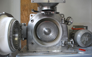 Le coeur du moulin avec ses rangées de broches